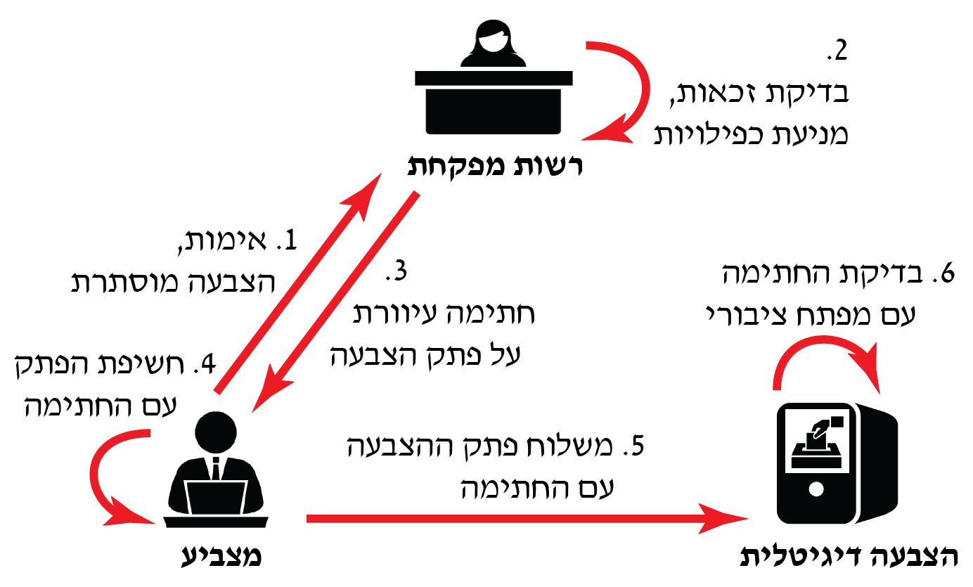 סכמת הצבעה דיגיטלית בסיסית